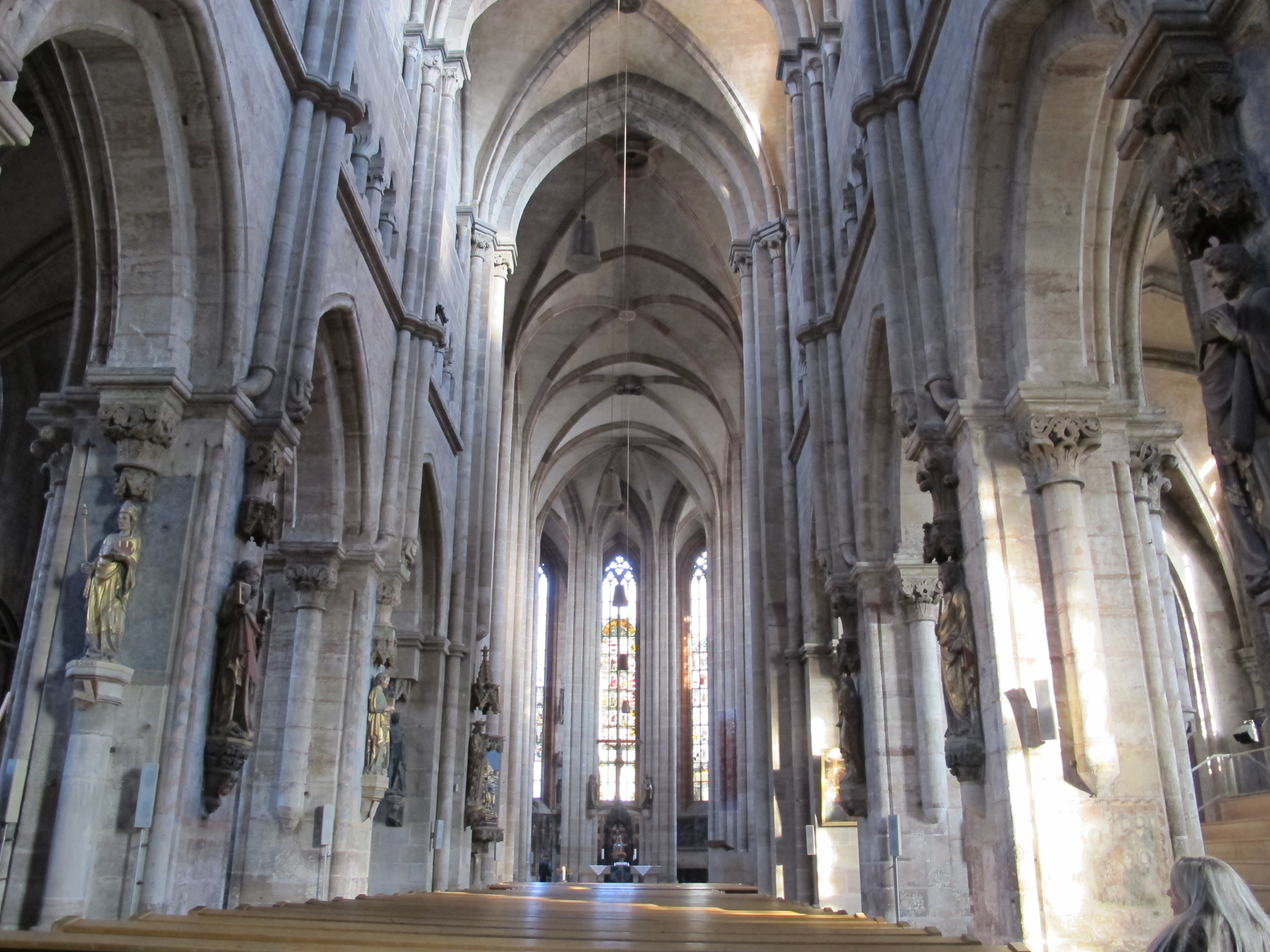 St. Sebald, Nuremberg, interrio